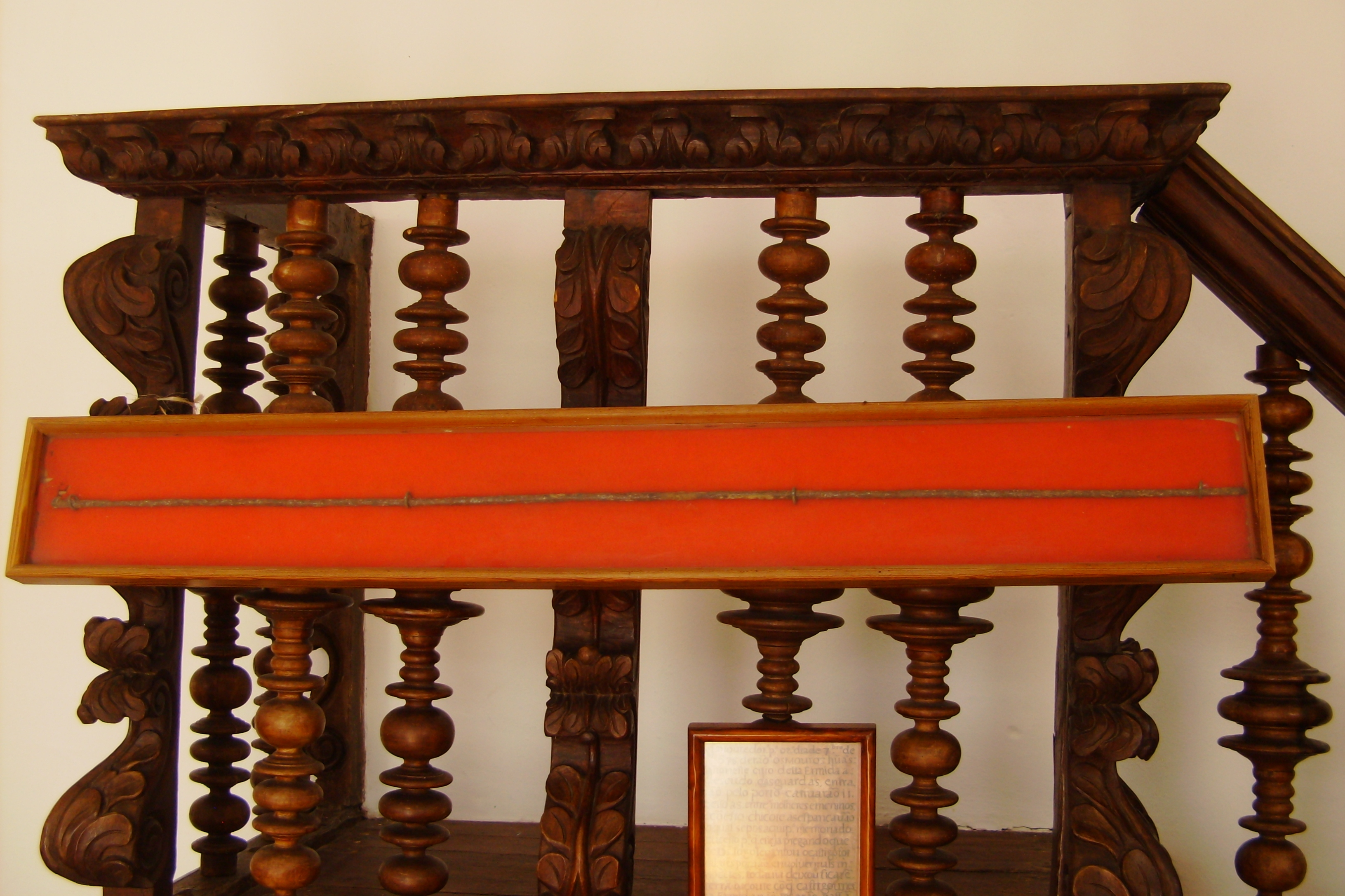 Ermida de Nossa Senhora dos Anjos, freguesia e concelho de Vila do Porto, ilha de Santa Maria, Açores: chicote que a tradição atribui aos piratas da Barbária.